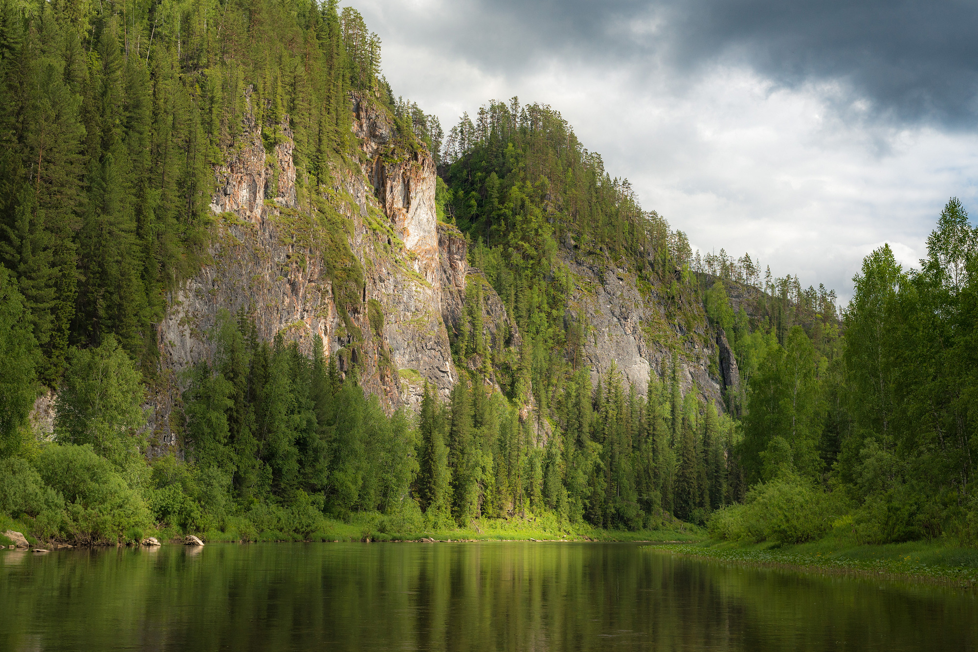 Шорский национальный парк: Территория национального парка расположена на юге Кемеровской области в Горной Шории и занимает юго-восточную часть Таштагольского района. Граница с Алтаем проходит по хребту Бийская грива, с Хакасией - по Абаканскому хребту, Таштагольский район, Кемеровская область This image is related to the protected area of Russia number 4200024